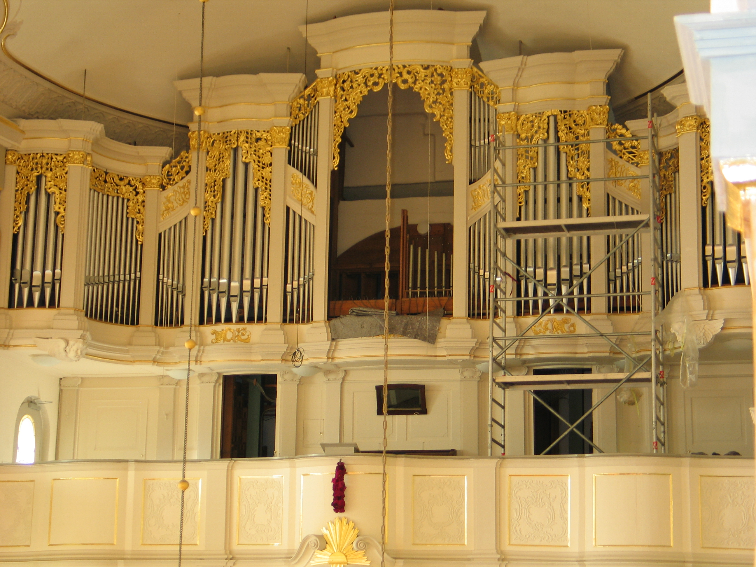 Die Jehmlich-Orgel der Martin-Luther-Kirche bedarf einer Überholung